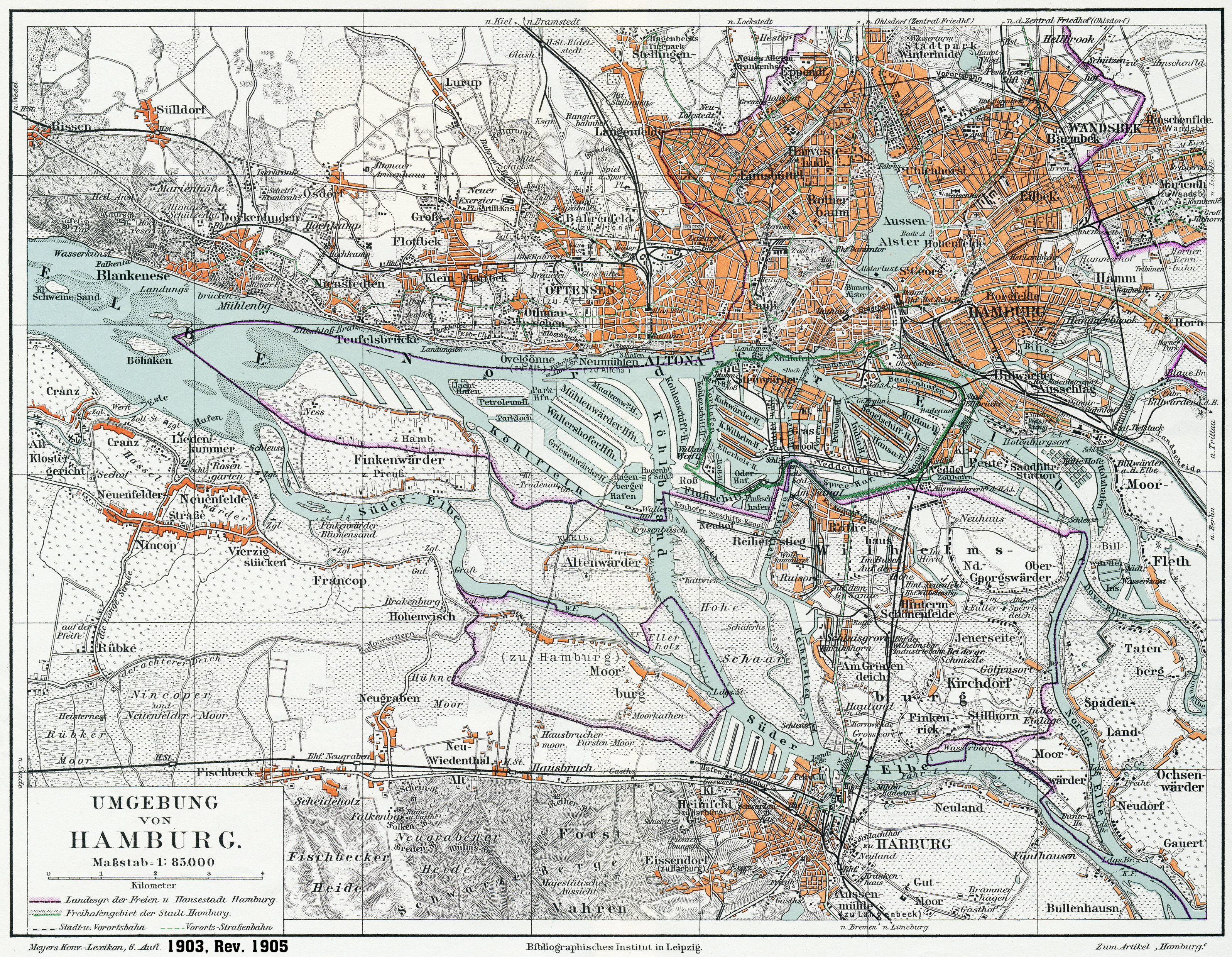 Hamburg und Umgebung, überarbeitete Version bezeichnet 1905, tatsächlich vermutlich 1914